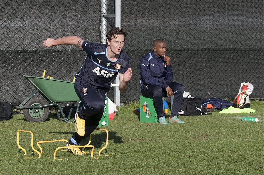 Daryl Janmaat